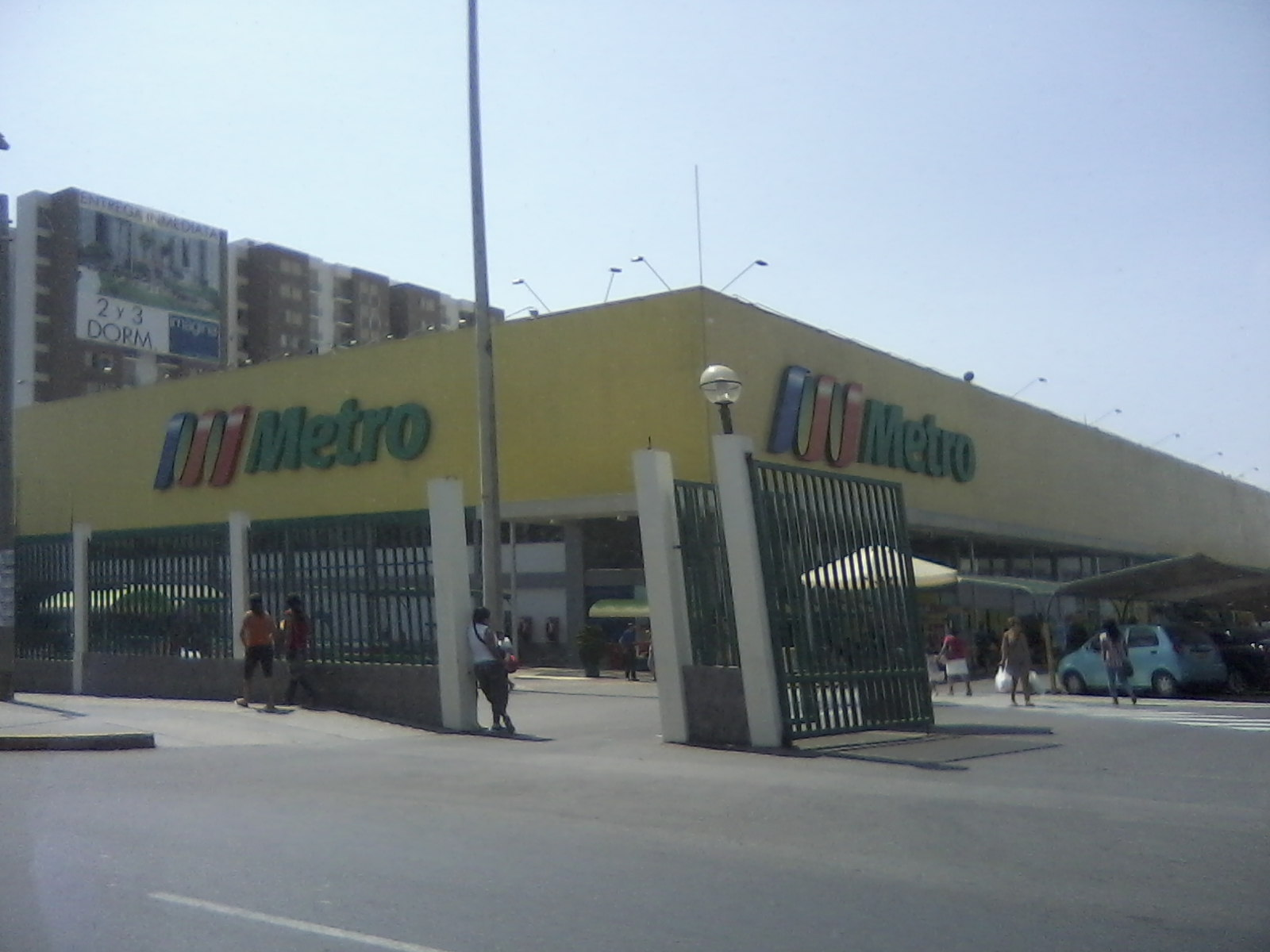 Supermercado Metro en el Cercado de Lima, Perú.